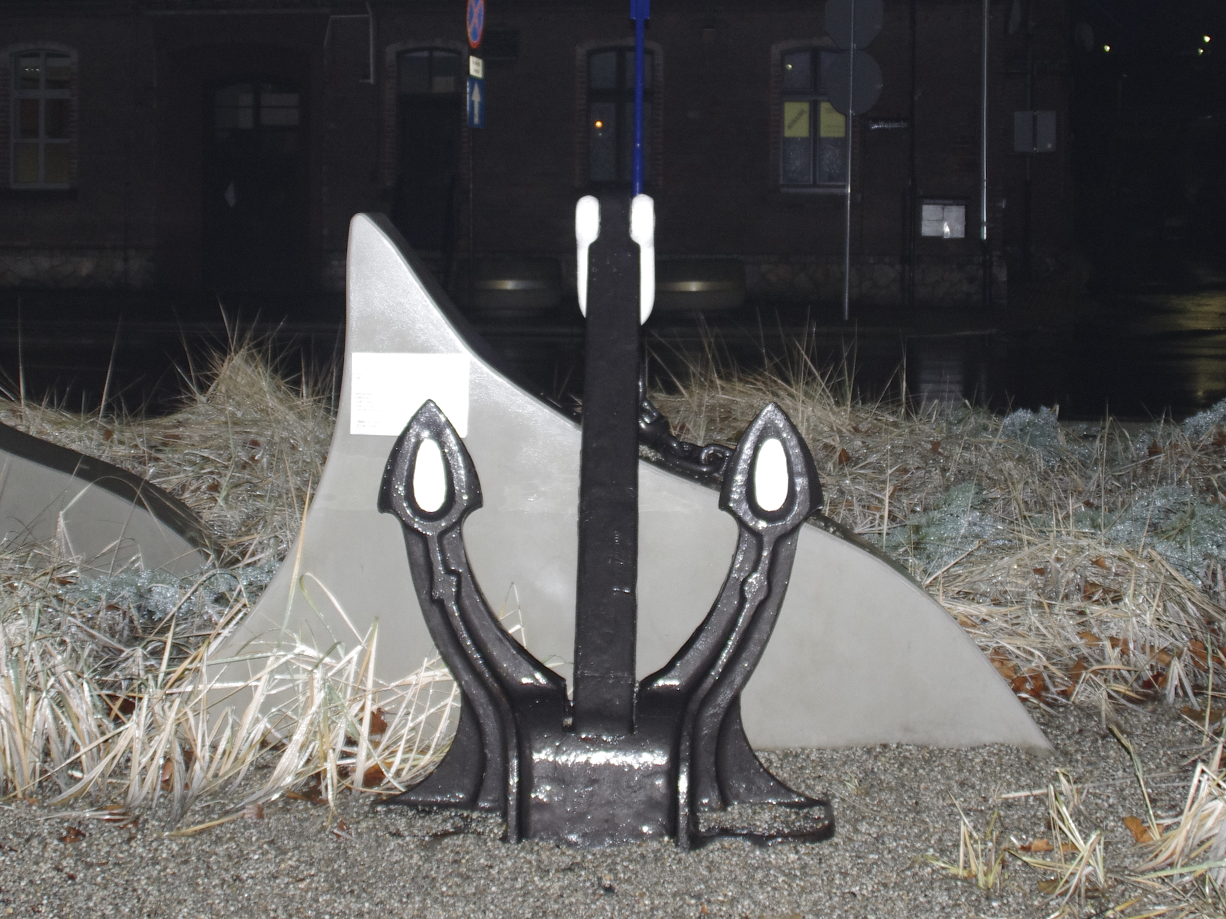 Kotwica Halla drobnicowca MS Radzionków na placu Letochów w Radzionkowie.